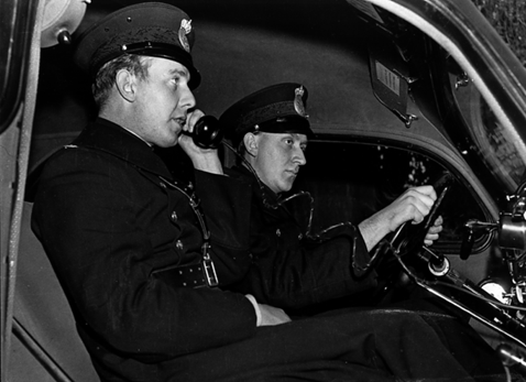 Interiör från en av Stockholmspolisens radiobilar. Högtalaren syns längst upp till höger